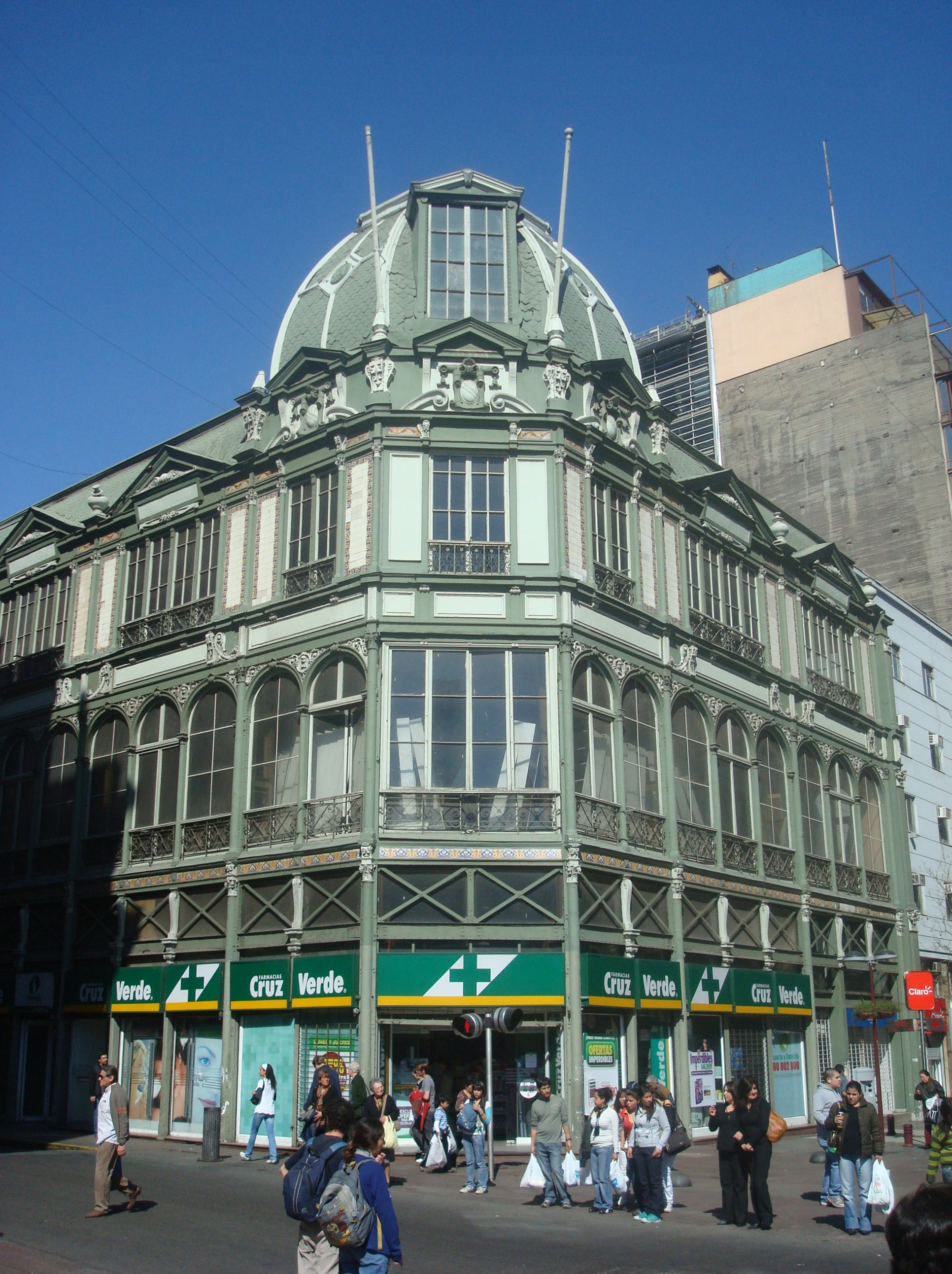 Edificio Comercial Edwards, Santiago de Chile